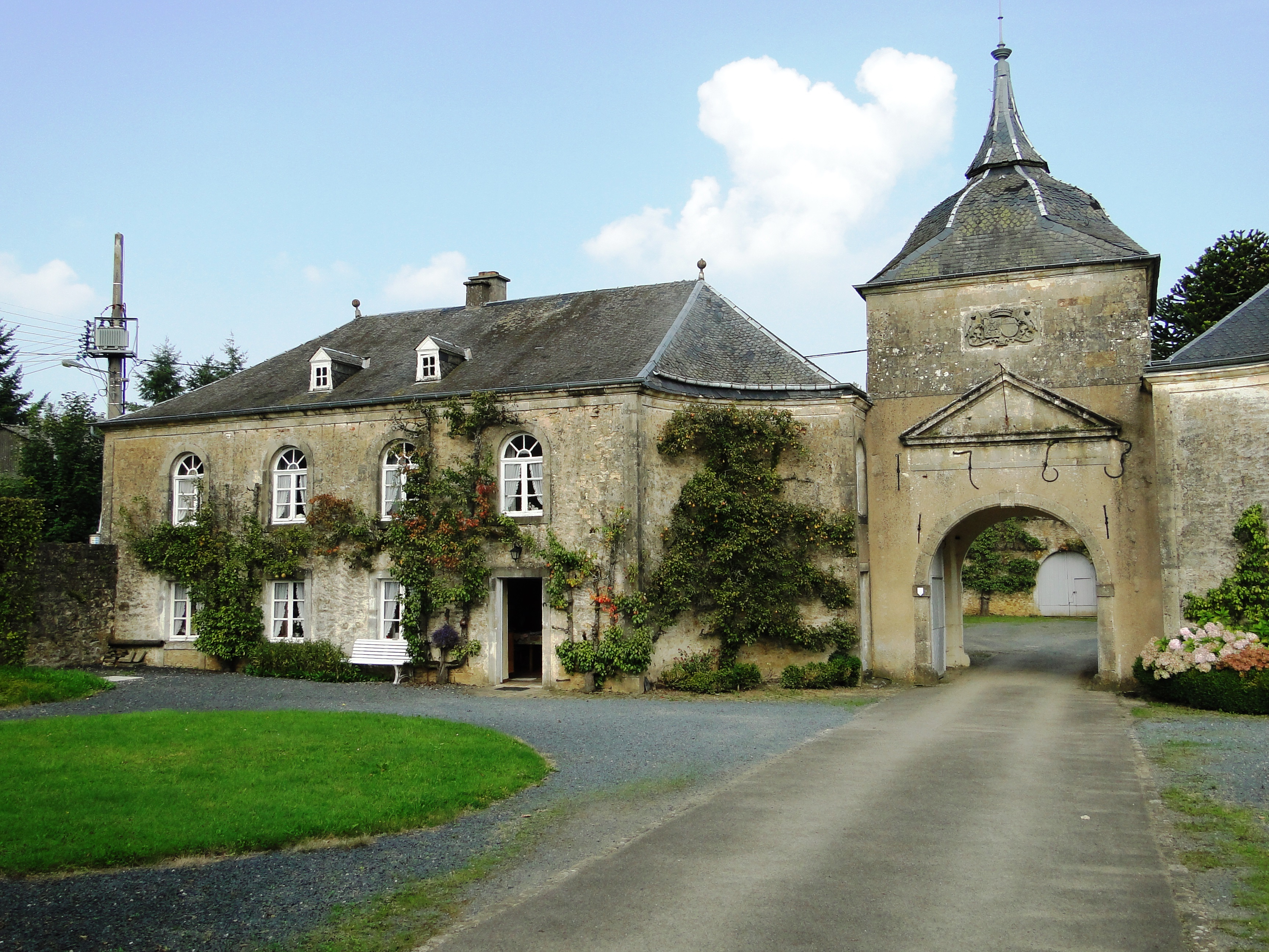 Extension de classement : dépendances du château de Guirsch et ferme avoisinante (S)